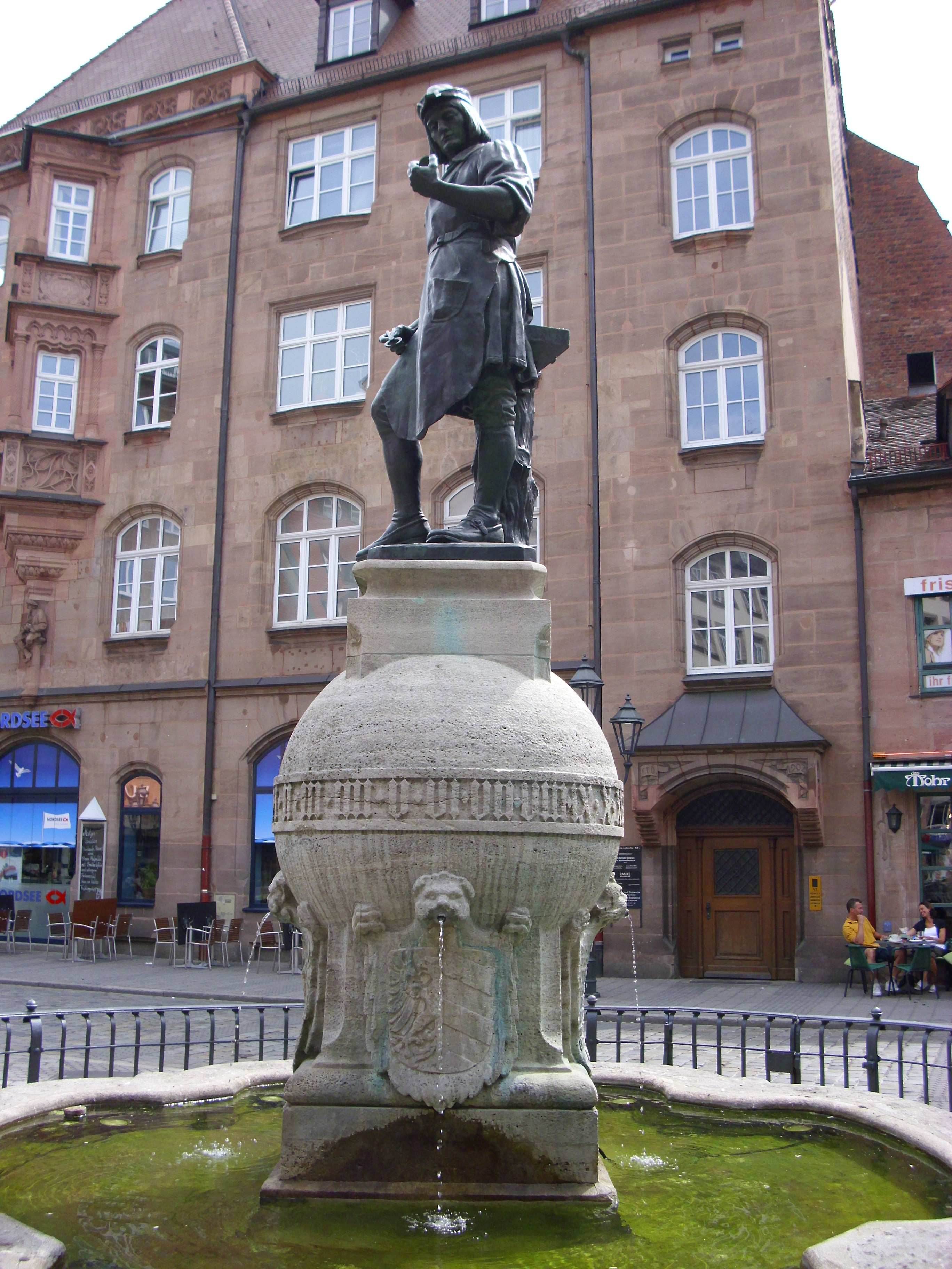 Peter-Henlein-Brunnen Juli 2010 03